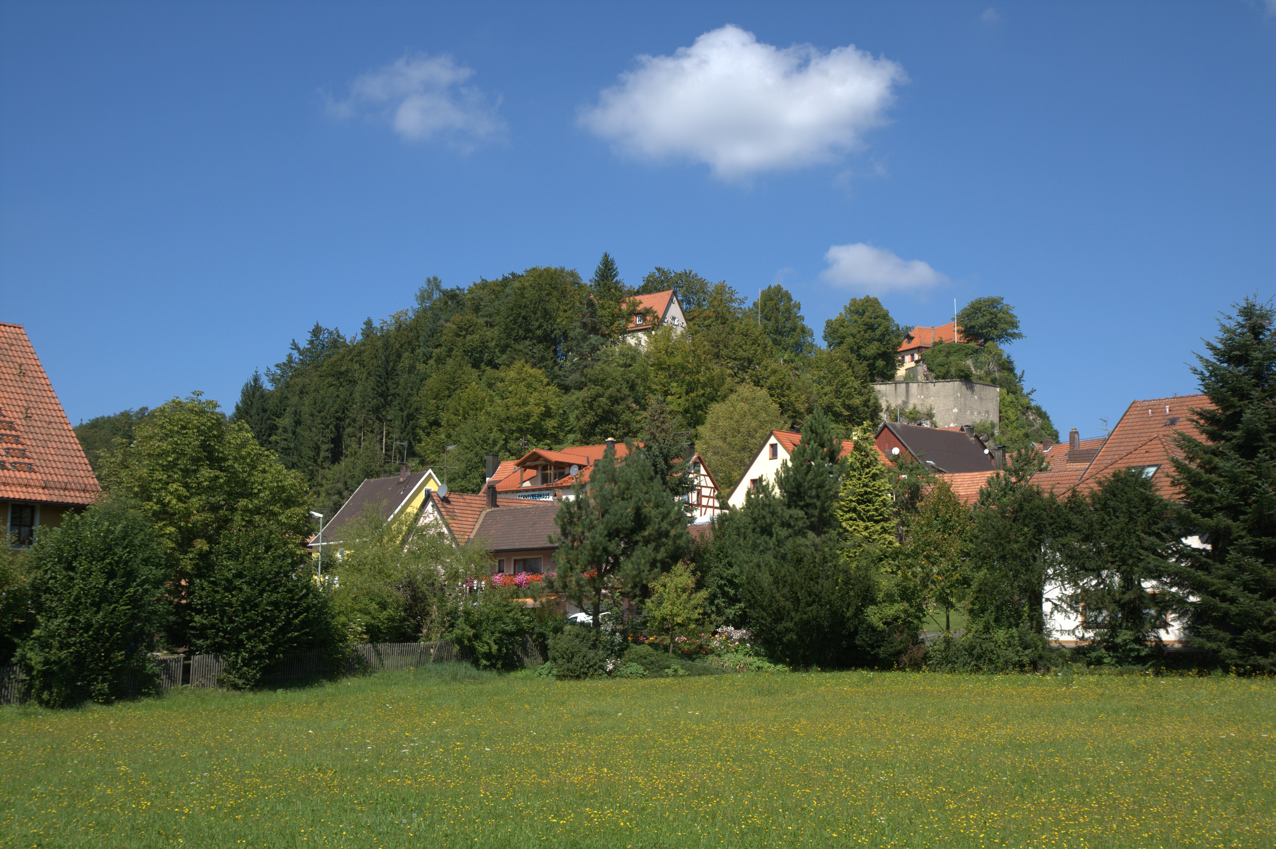 Burg Betzenstein - Ansicht des Burgberges aus südöstlicher Richtung